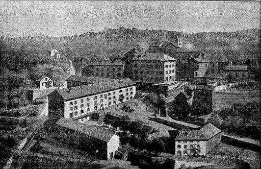 L'établissement thermal des Escaldes en 1896.